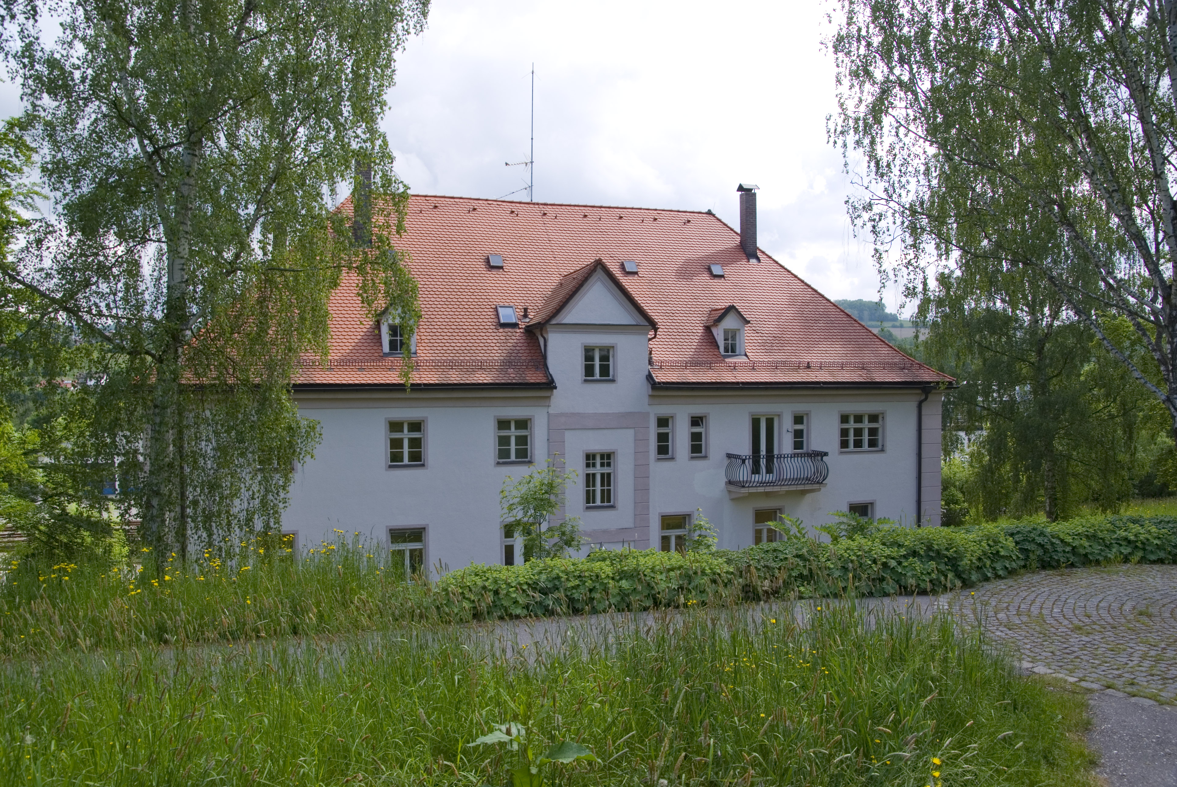 Dr. Schellerer Park in Viechtach.